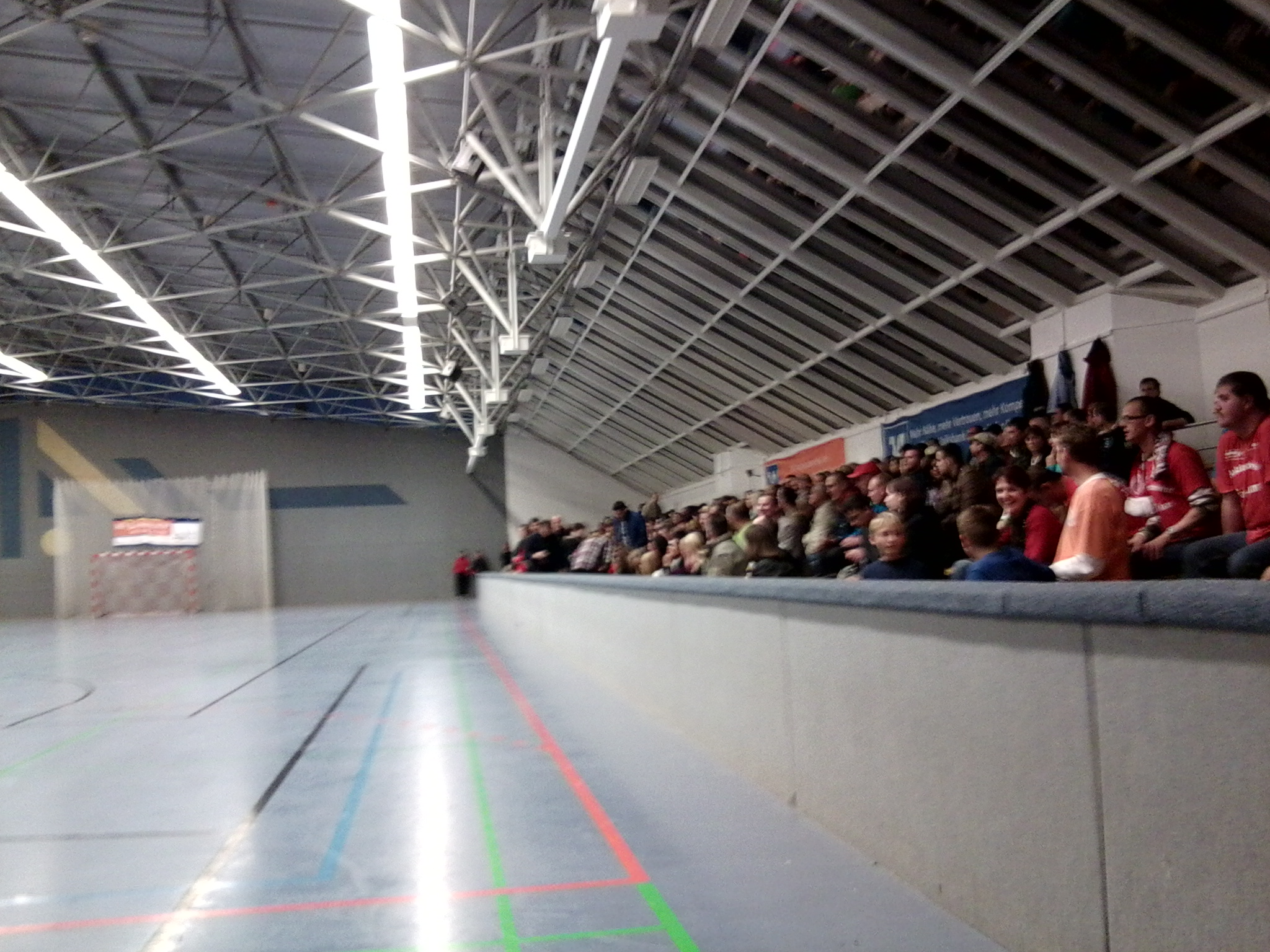 Die W. Seelenbinder Sporthalle in Hermsdorf während eines Spiels.